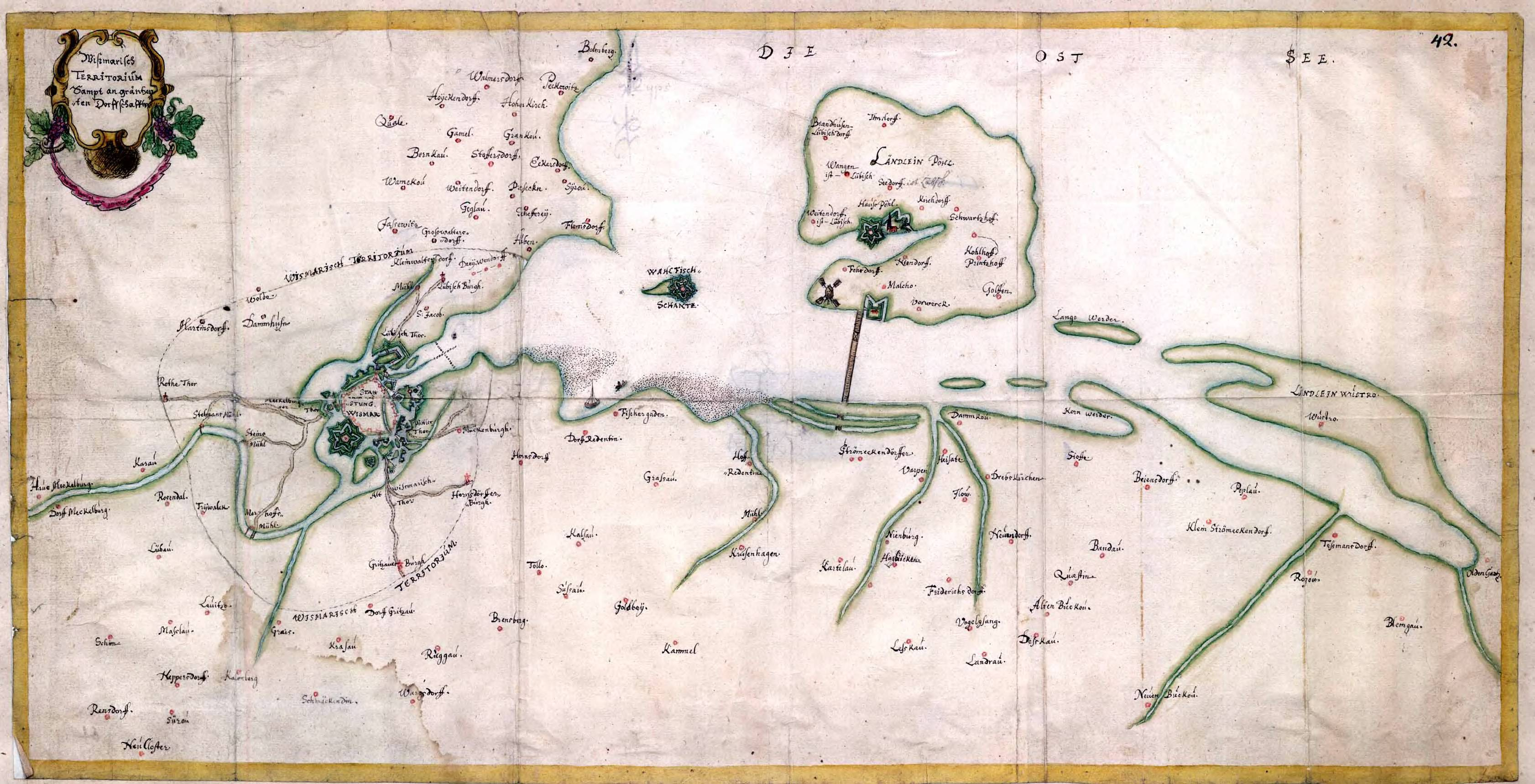 Karte der Wismarer Bucht mit den Inseln Walfisch und Poel aus dem schwedischen Kriegsarchiv, dort auf 1850 datiert.